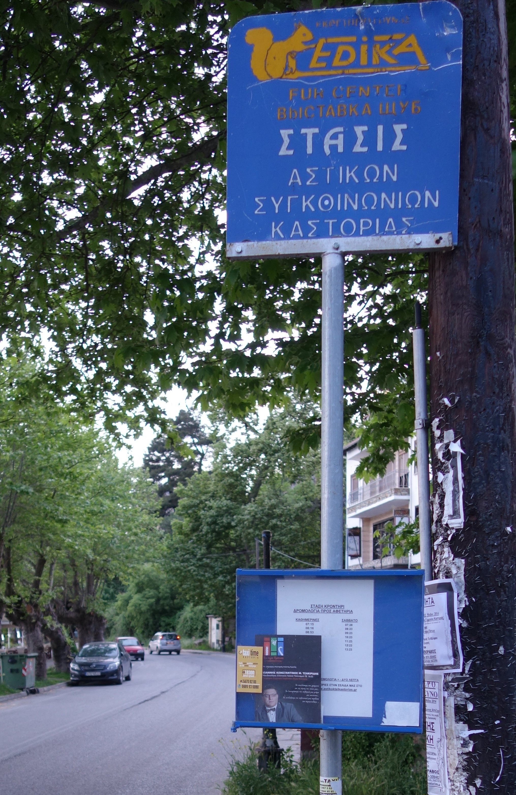 Kürschner in der Stadt Kastoria, Griechenland. Bushaltestelle (alle Haltestellen in Kastoria sind ebenso gestaltet und tragen den gleichen Hinweis): "EDIKA FUR CENTER KASTORIA" (EDIKA, Pelzzentrum Kastoria). Siehe auch Kürschner in der Präfektur Kastoria und Kürschner in der Stadt Siatista.